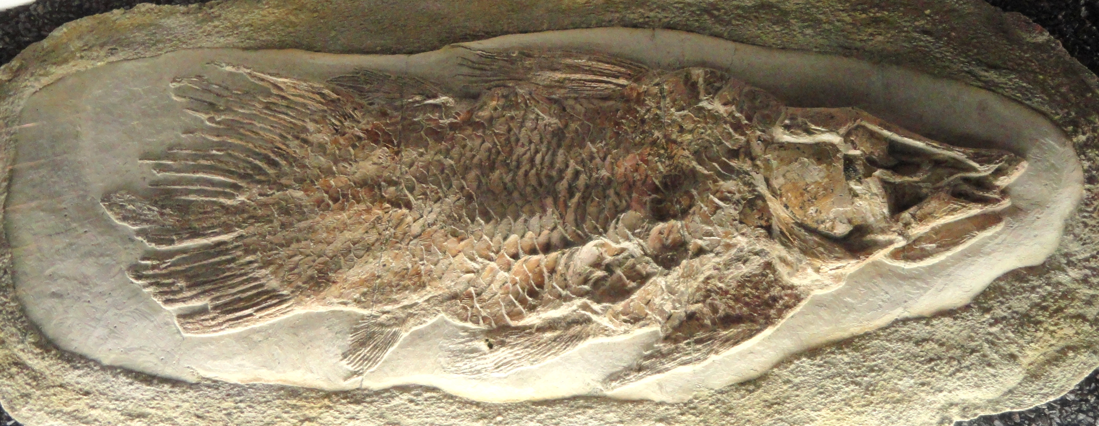 Exhibit in Naturmuseum Senckenberg, Frankfurt am Main, Germany.